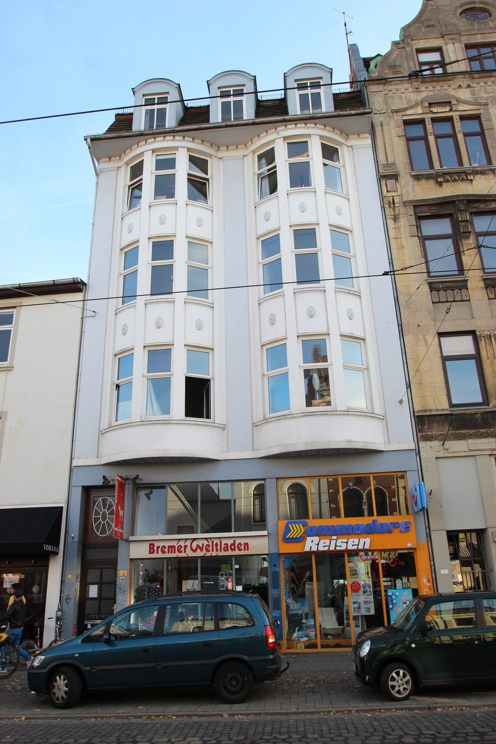 Wohnhaus in Bremen, Ostertorsteinweg 90Das abgebildete Objekt ist ein geschütztes Kulturdenkmal in der Freien Hansestadt Bremen, mit der Nr. 0980 beim Landesamt für Denkmalpflege registriert.